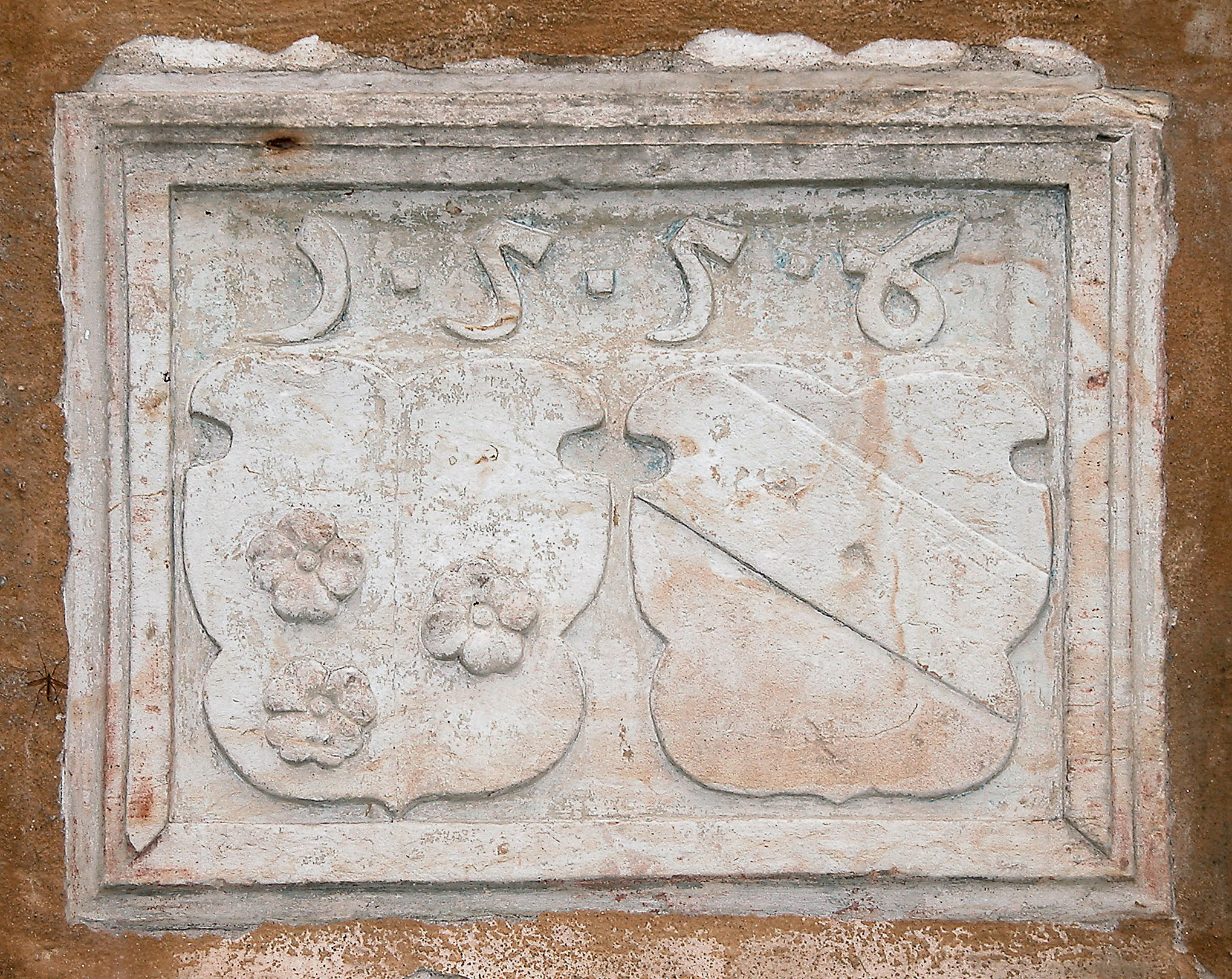 17.07.2003 01665 Schieritz (Diera-Zehren): Schloß, Heutiger Bau 1556-1601. Wappen am Hofflügel des Georg von Schleinitz und seine zweite Ehefrau Martha von Starschedel. [DSCN1435]20030717480JPG(c)Blobelt